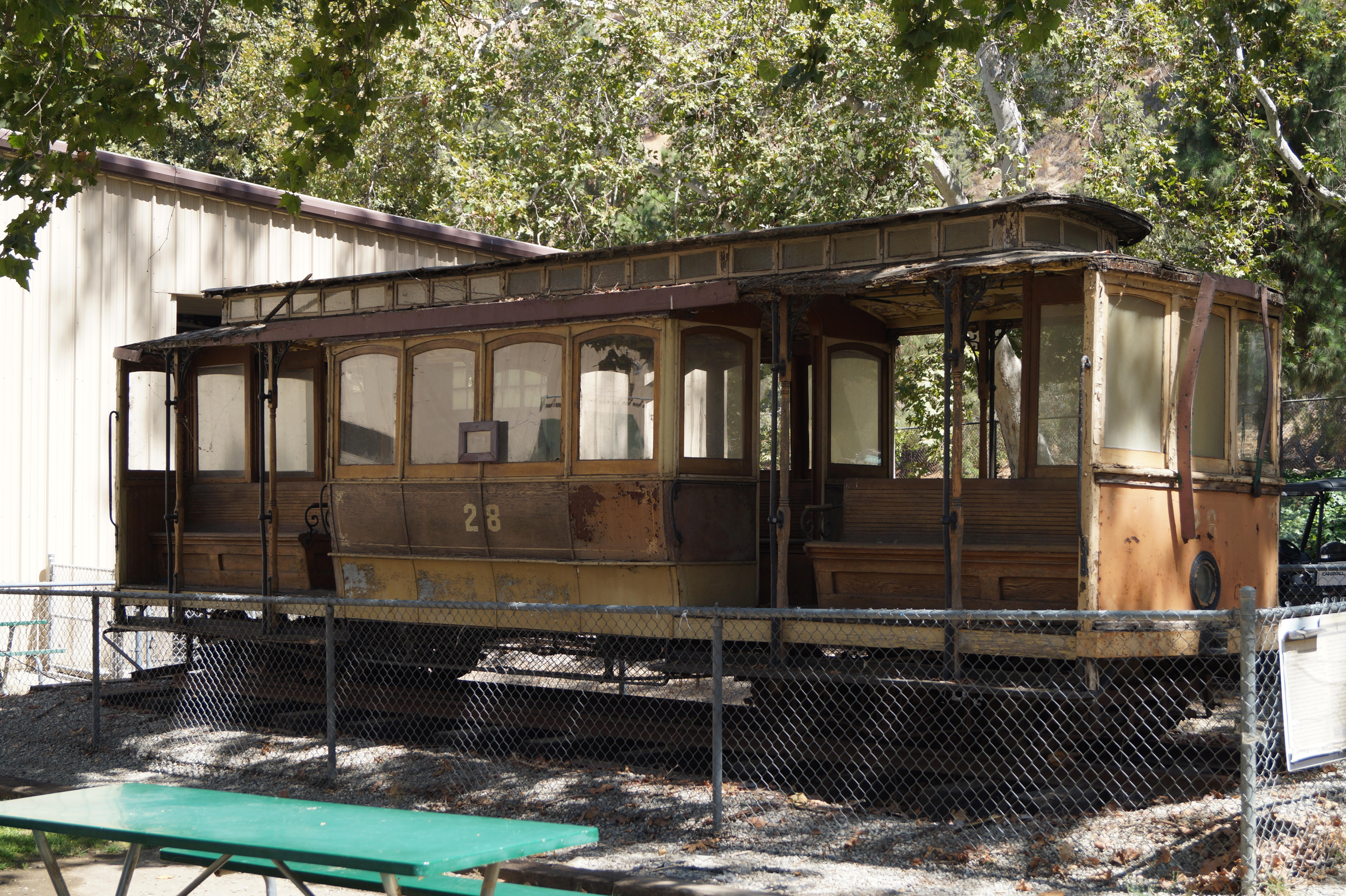 Travel Town Museum is a transport museum dedicated in the northwest corner of Los Angeles, California's Griffith Park. The history of railroad transportation in the western United States from 1880 to the 1930s is the primary focus of the museum's collection, with an emphasis on railroading in Southern California and the Los Angeles area.